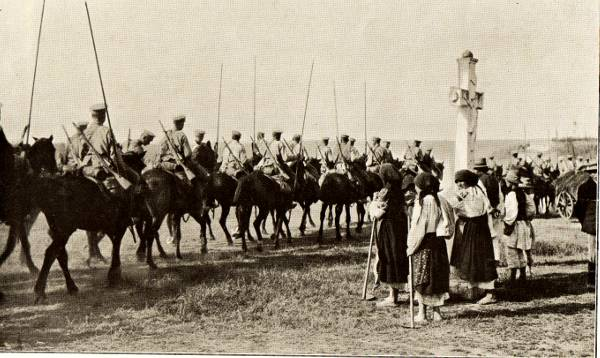 «Казаки в галицийской деревне» // Великая война в образах и картинах : [в 14 вып.] / под ред. Ив. Лазаревского. — М.: Издание Д. Я. Маковского, 1914-1917 (Товарищество типографии А. И. Мамонтова); [Вып. 9]. — 1916. — С. 10.